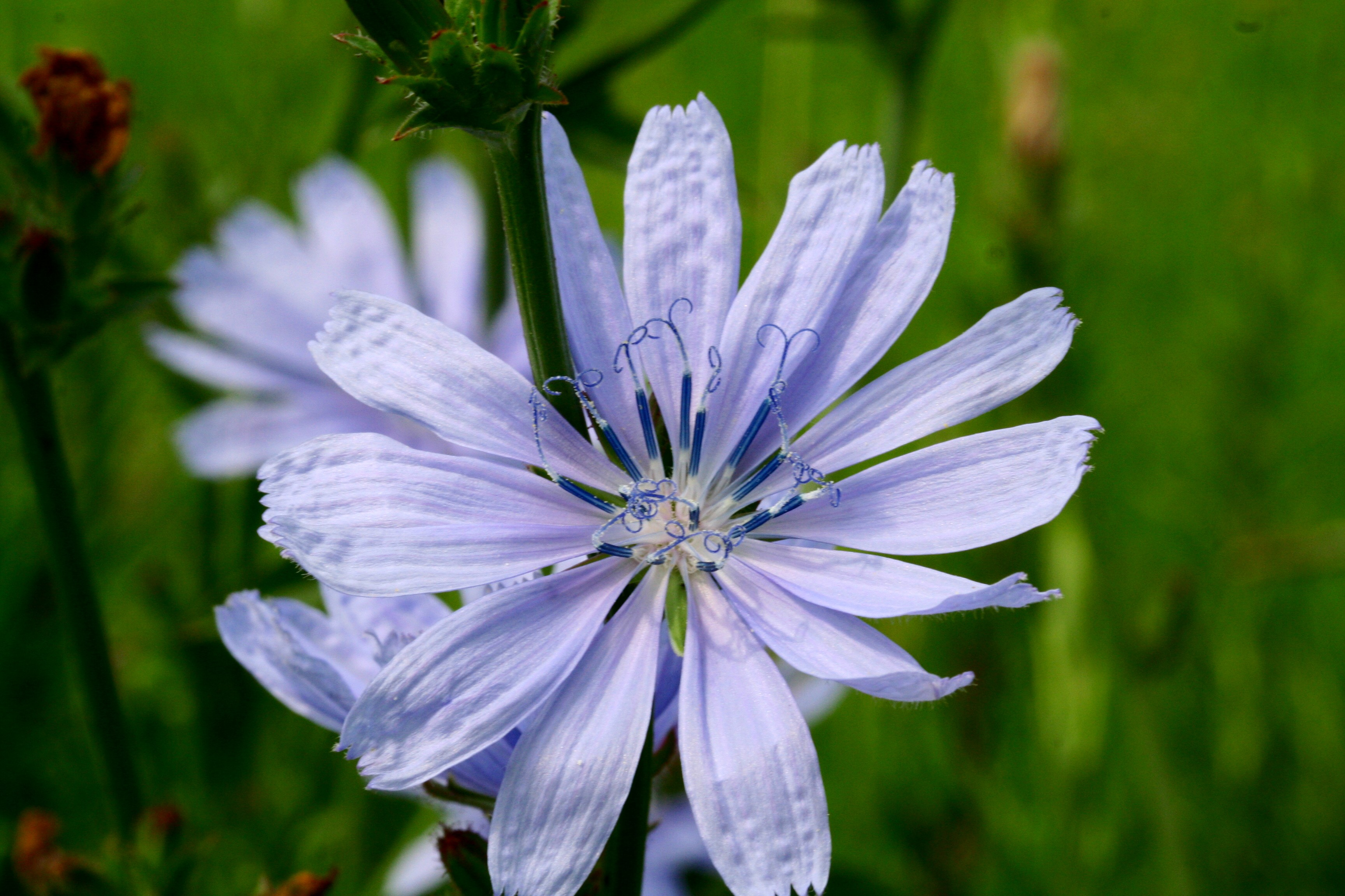 Cichorium intybus (Cicoria comune)